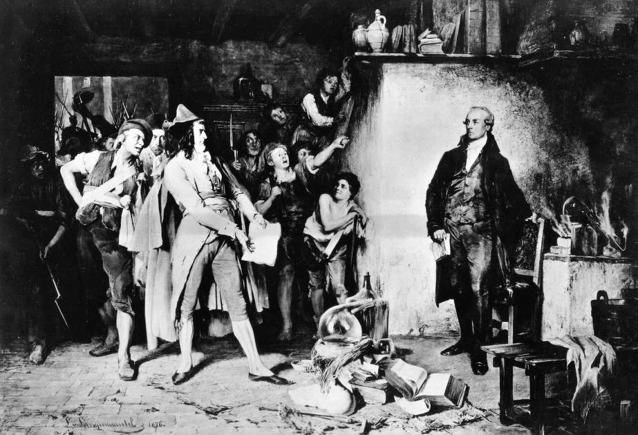 Ludwig von Langenmantel, Verhaftung von Antoine Laurent de Lavoisier, 1794